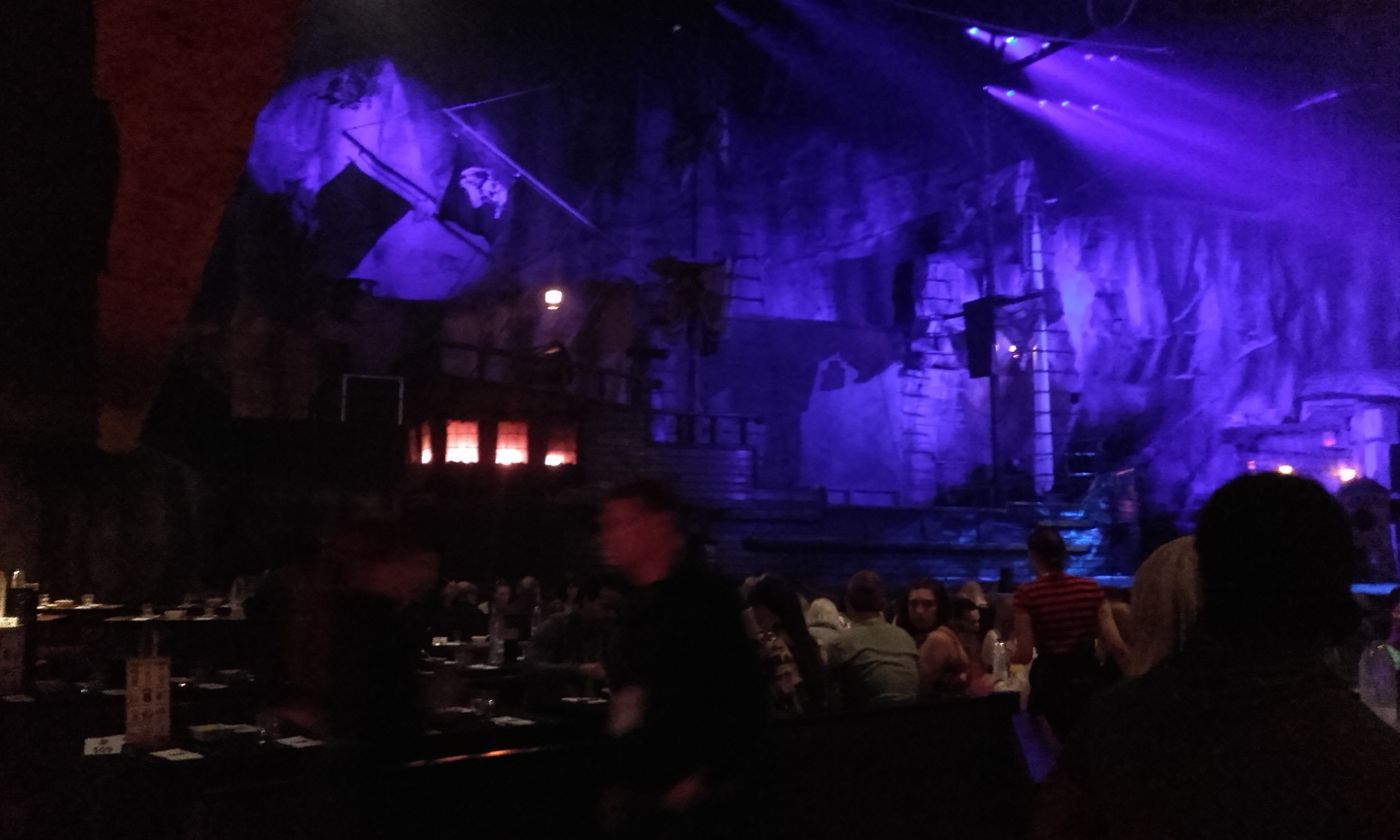 Escenario de Pirates Adventure, en Magaluf, Mallorca.